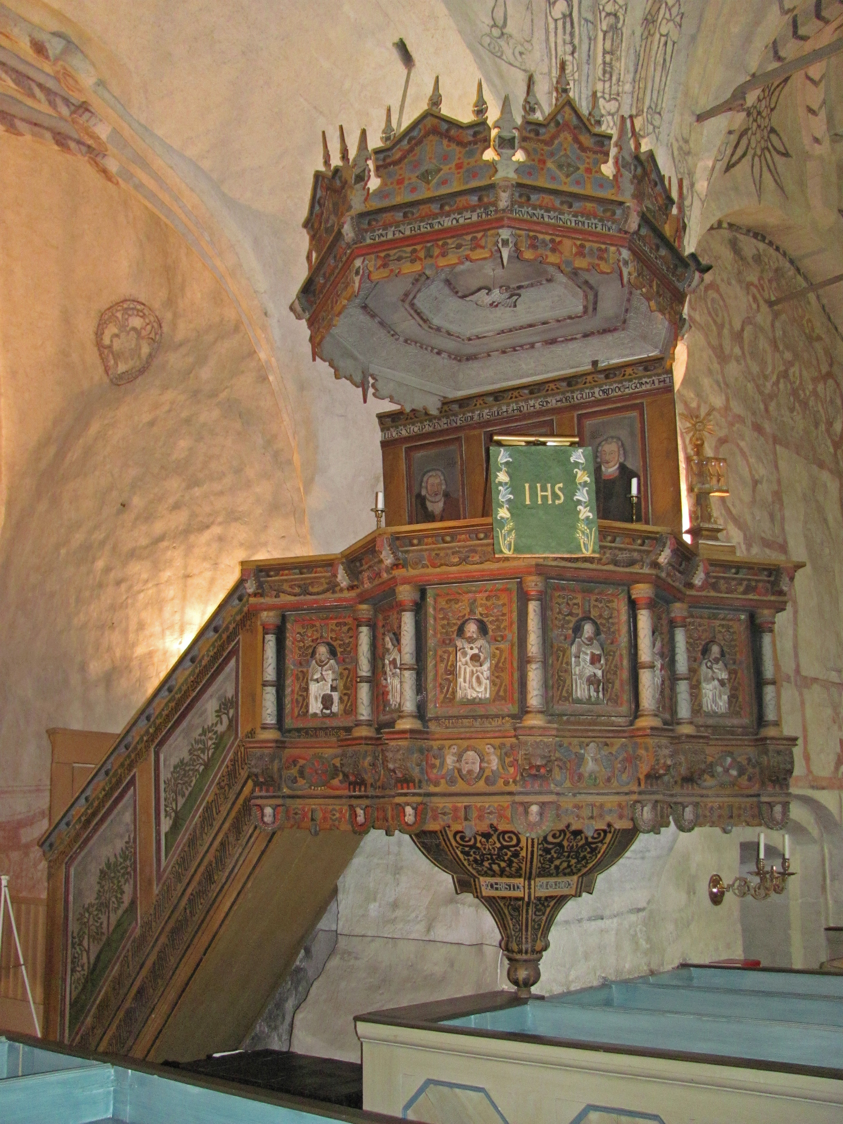 Säby kyrka, Västmanland, predikstol